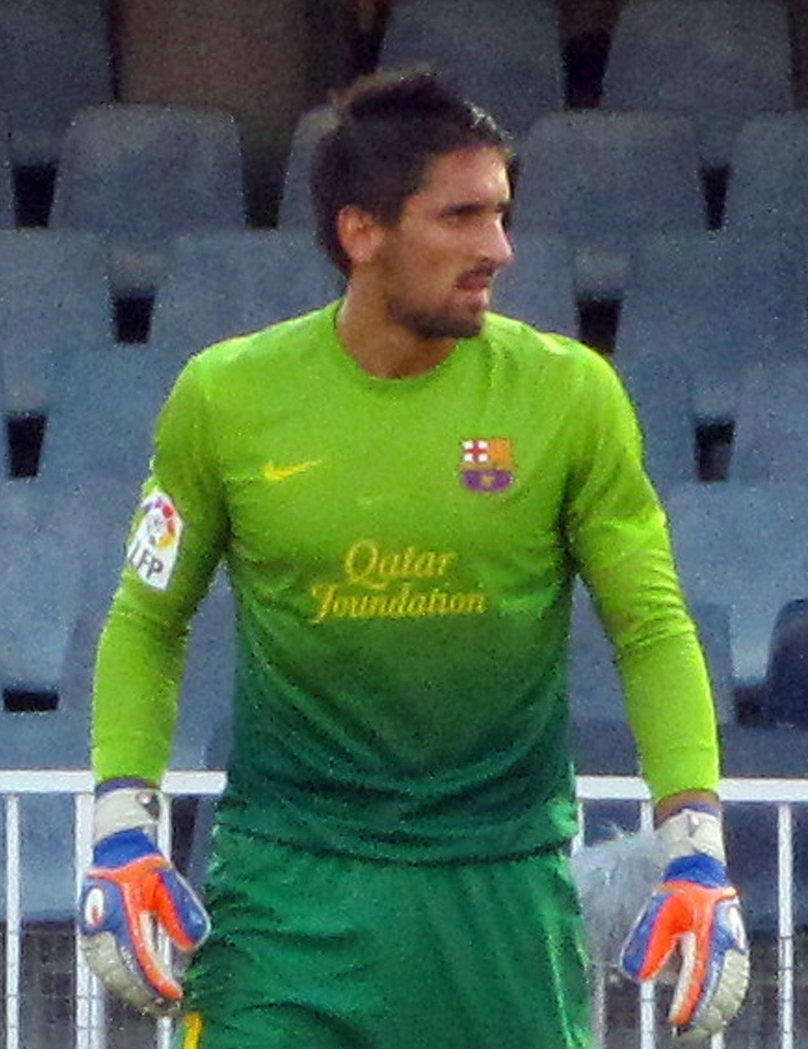 FC Barcelona B keeper Oier Olazábal in a 2012-13 home/primary goalkeeper kit. Foto realizada por Javier Segura (@castroquini)